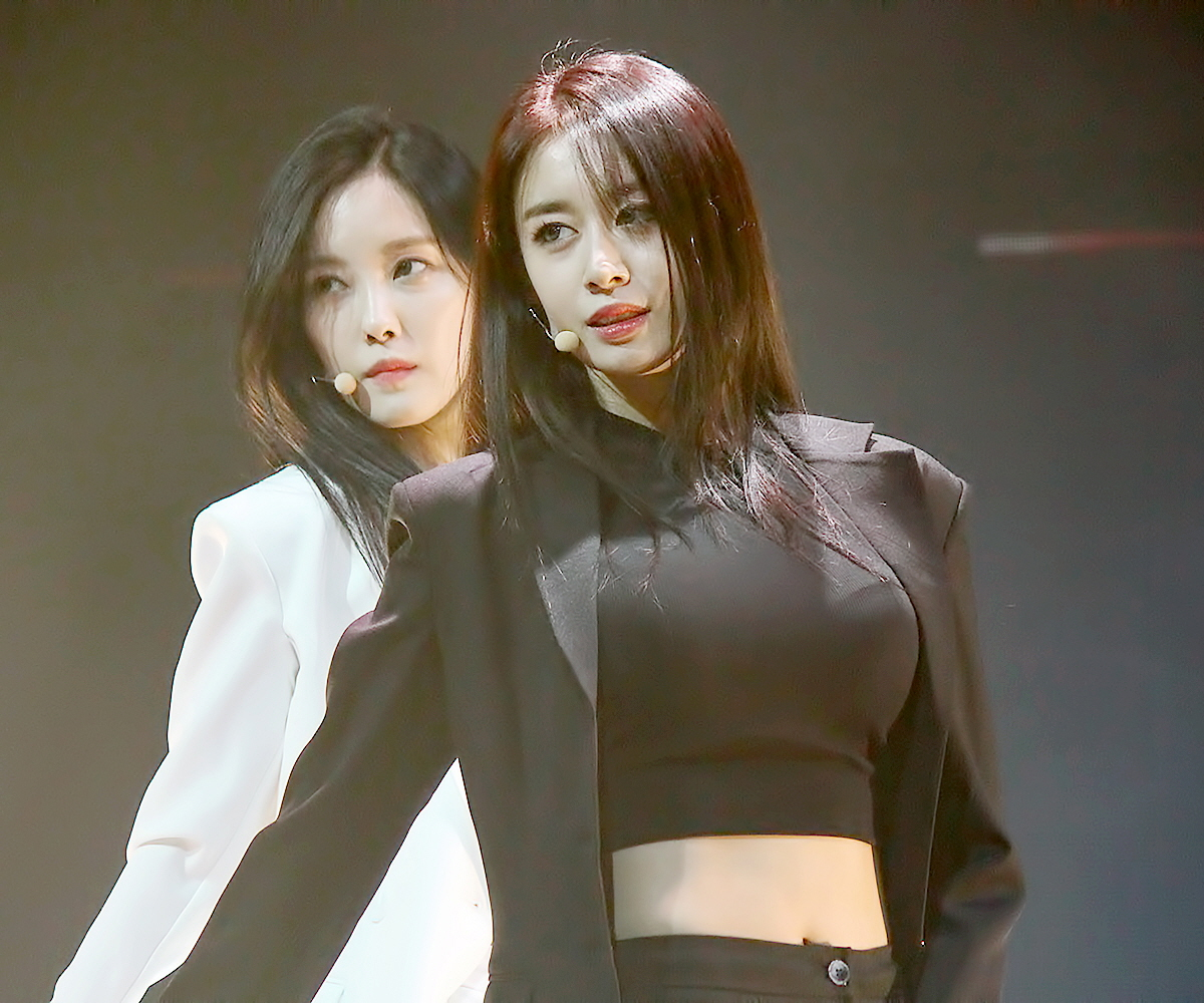 170614 티아라 쇼케이스 직찍